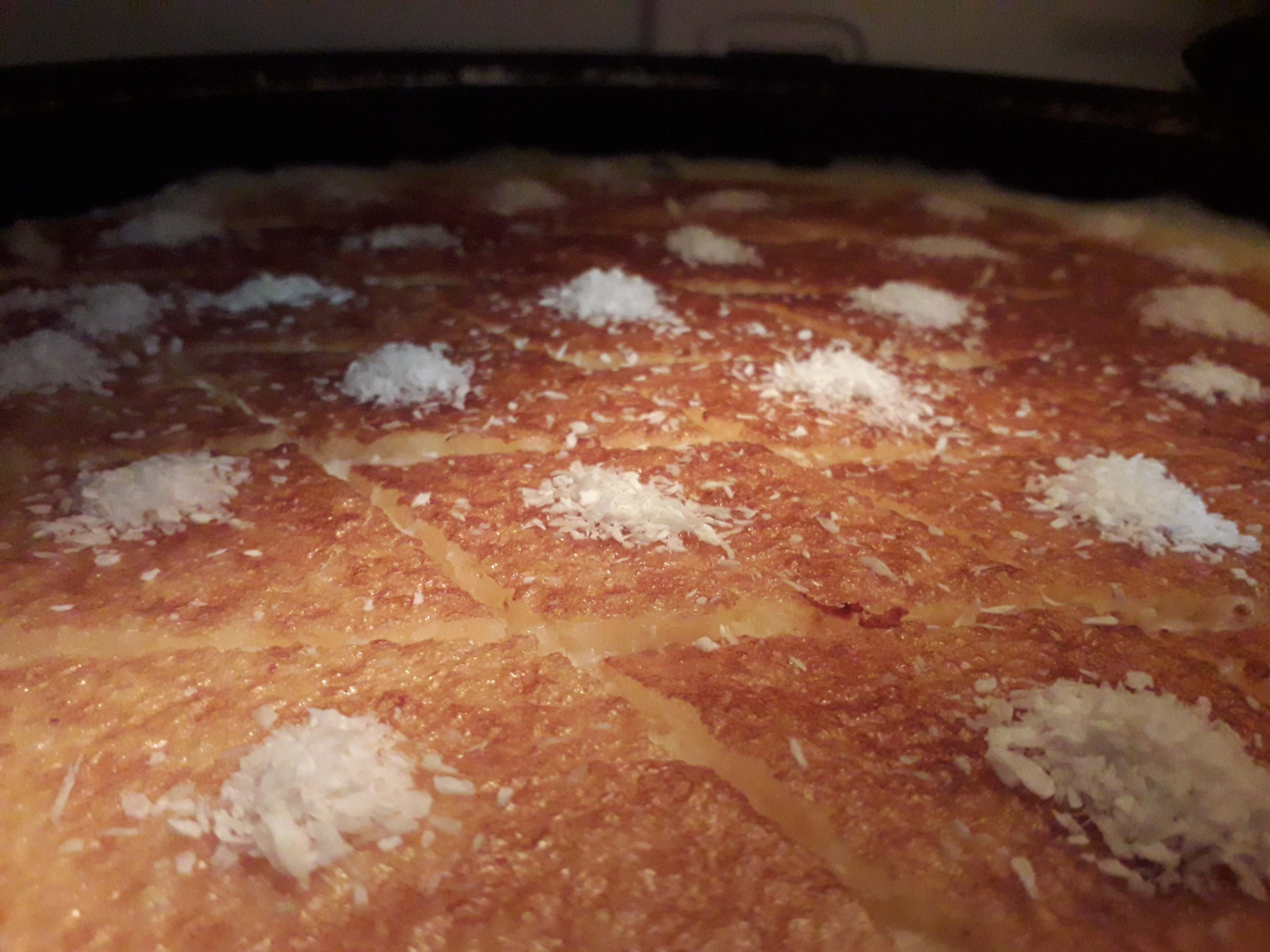 الهريسة أحد أنواع الحلويات الشامية.